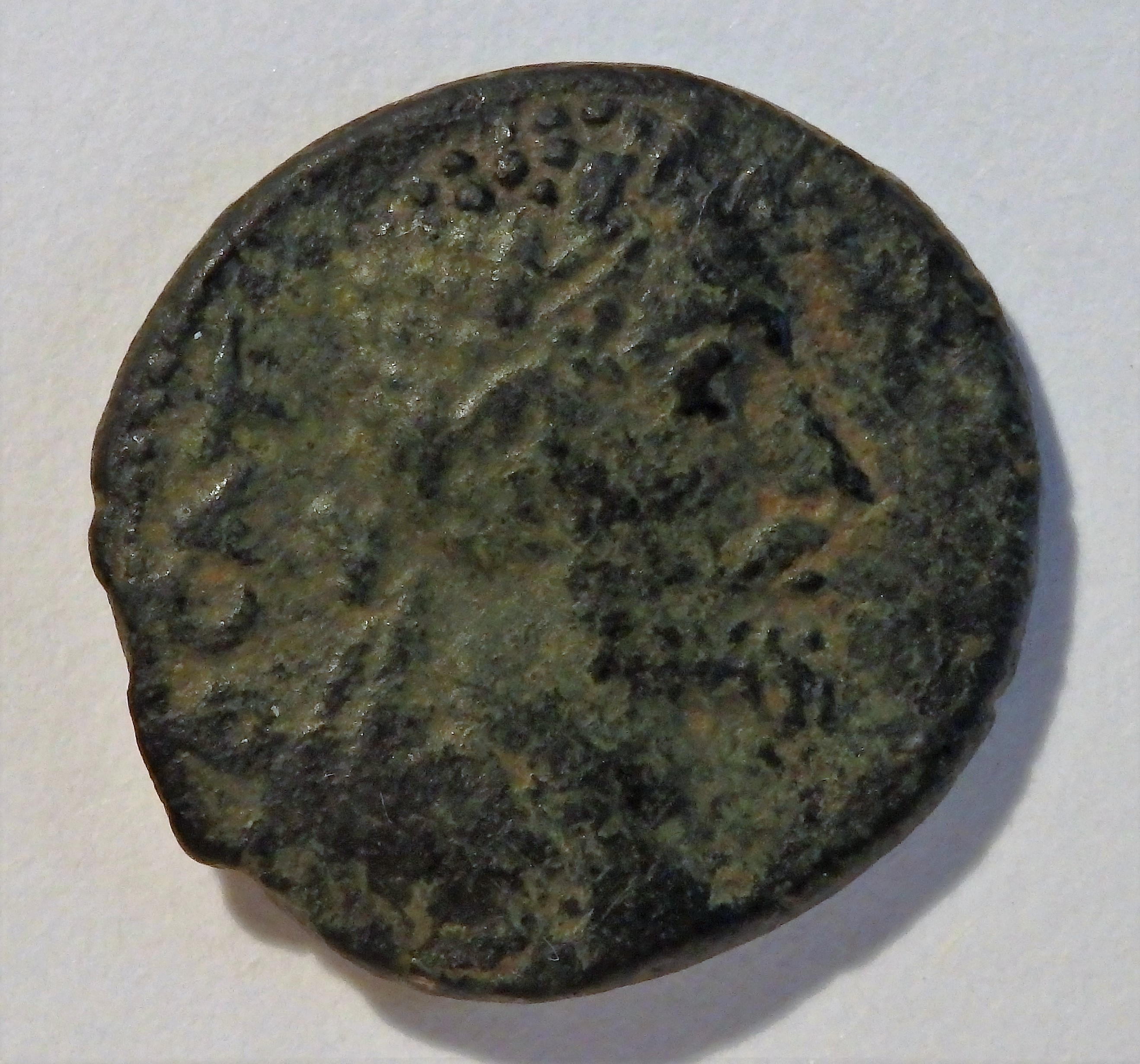 Bronzemünze Abgars VIII. mit Septimius Severus